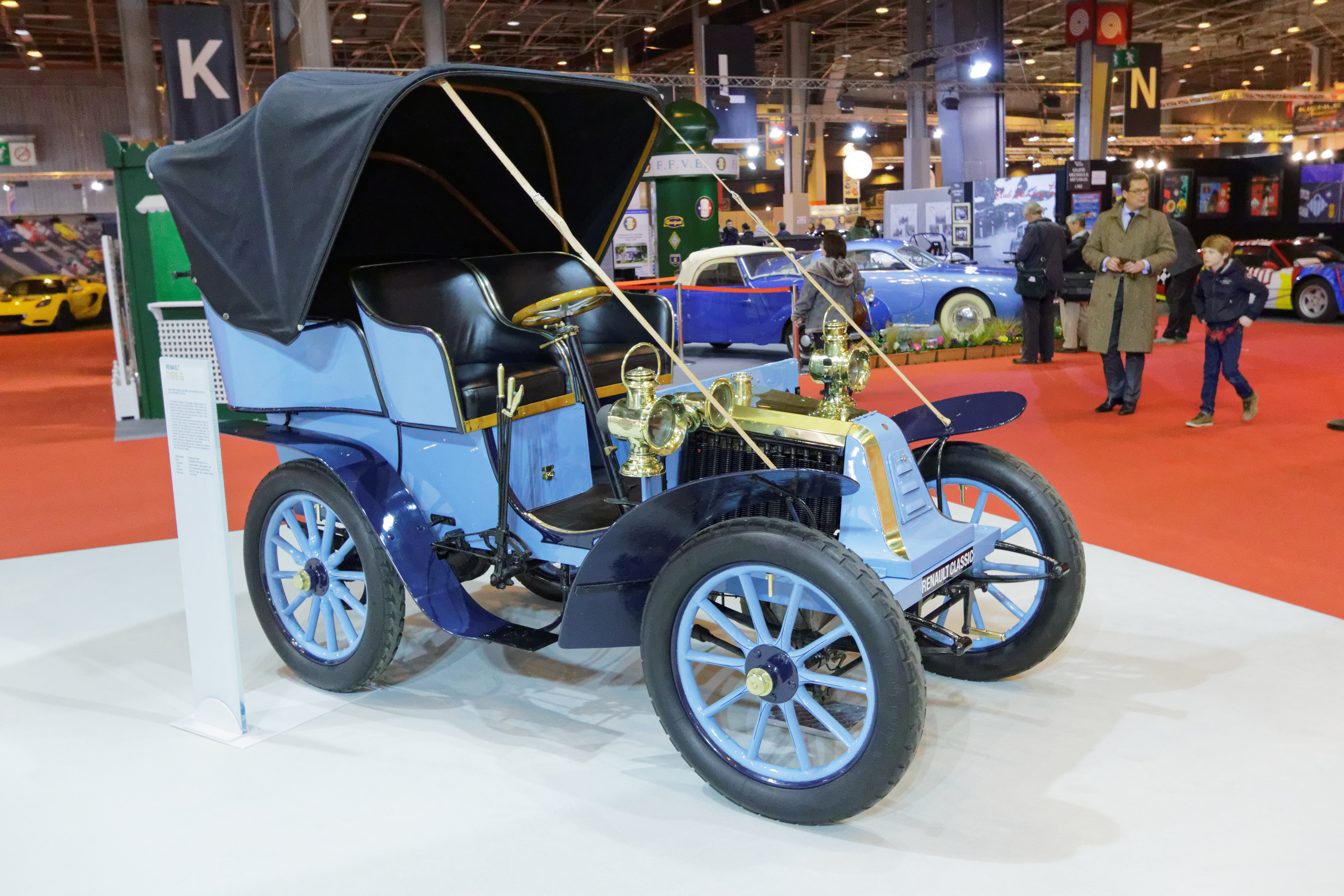 Une des voiture présentée lors du salon Rétromobile de Paris 2015